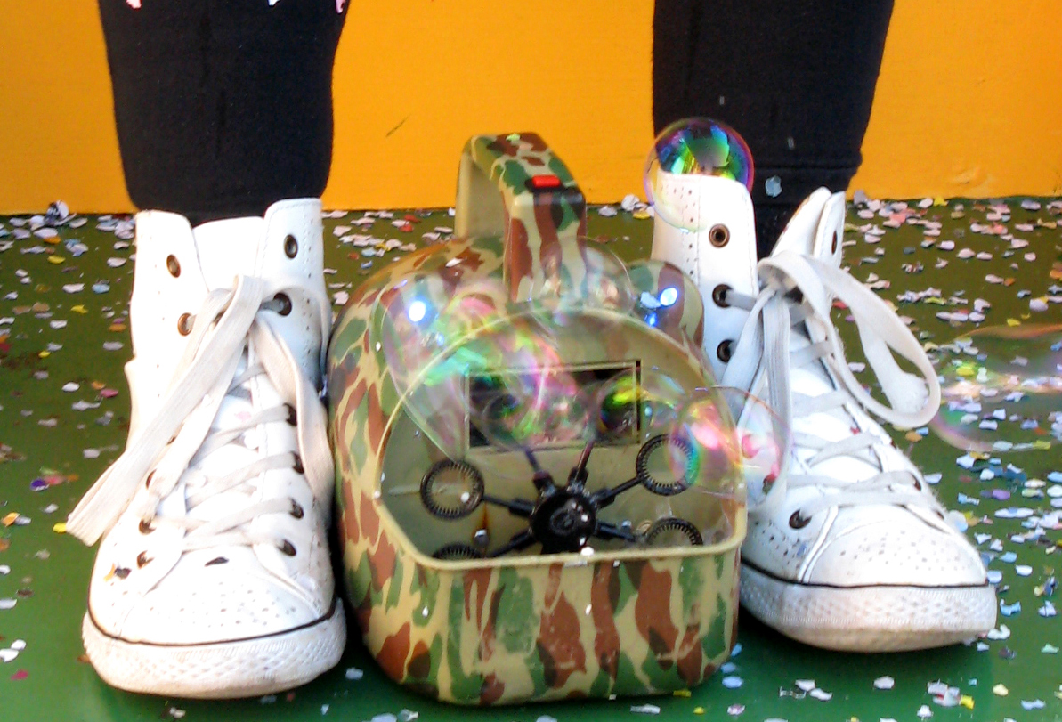 Doullens (Somme, France) - Le Carnaval d'été. Détail du "vélo-taxi-bulles", sur son parcours 'Rue de Lavarenne : le générateur de bulles de savon. . .